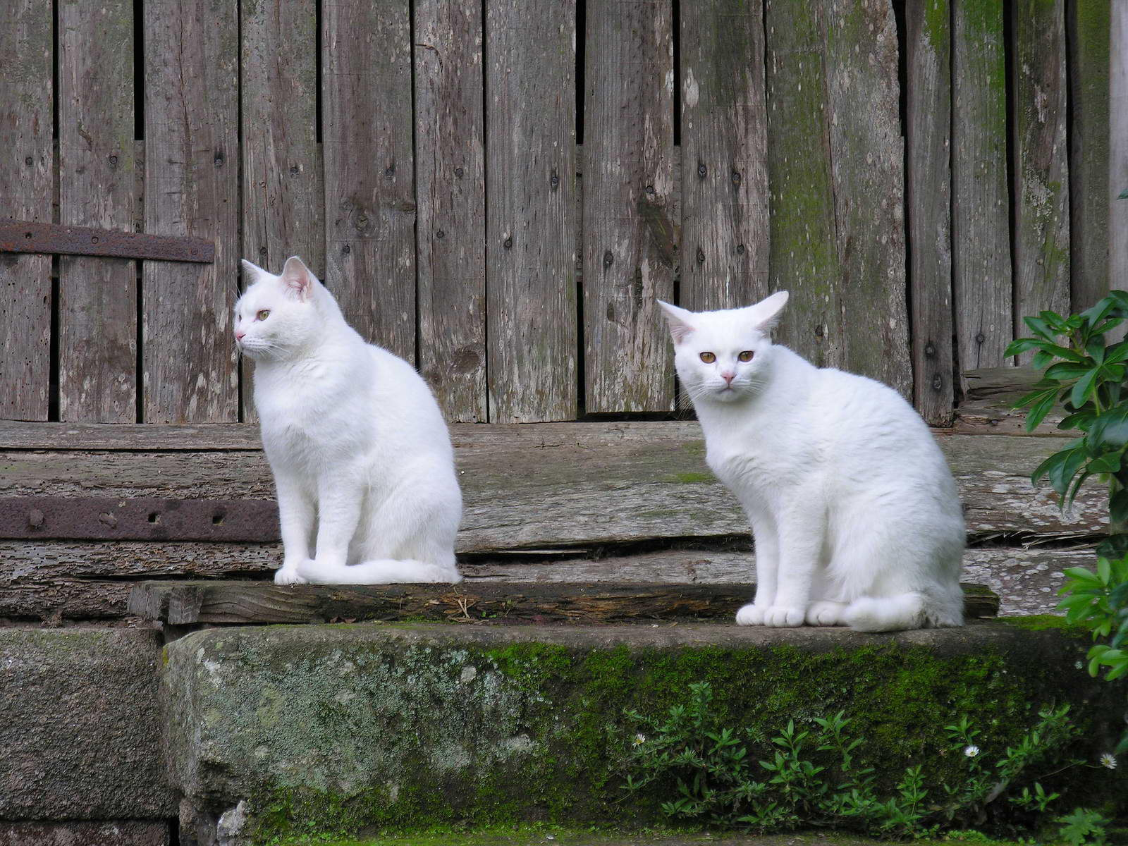 Gatos en Galicia Publish by= Luis Miguel Bugallo Sánchez. Self made